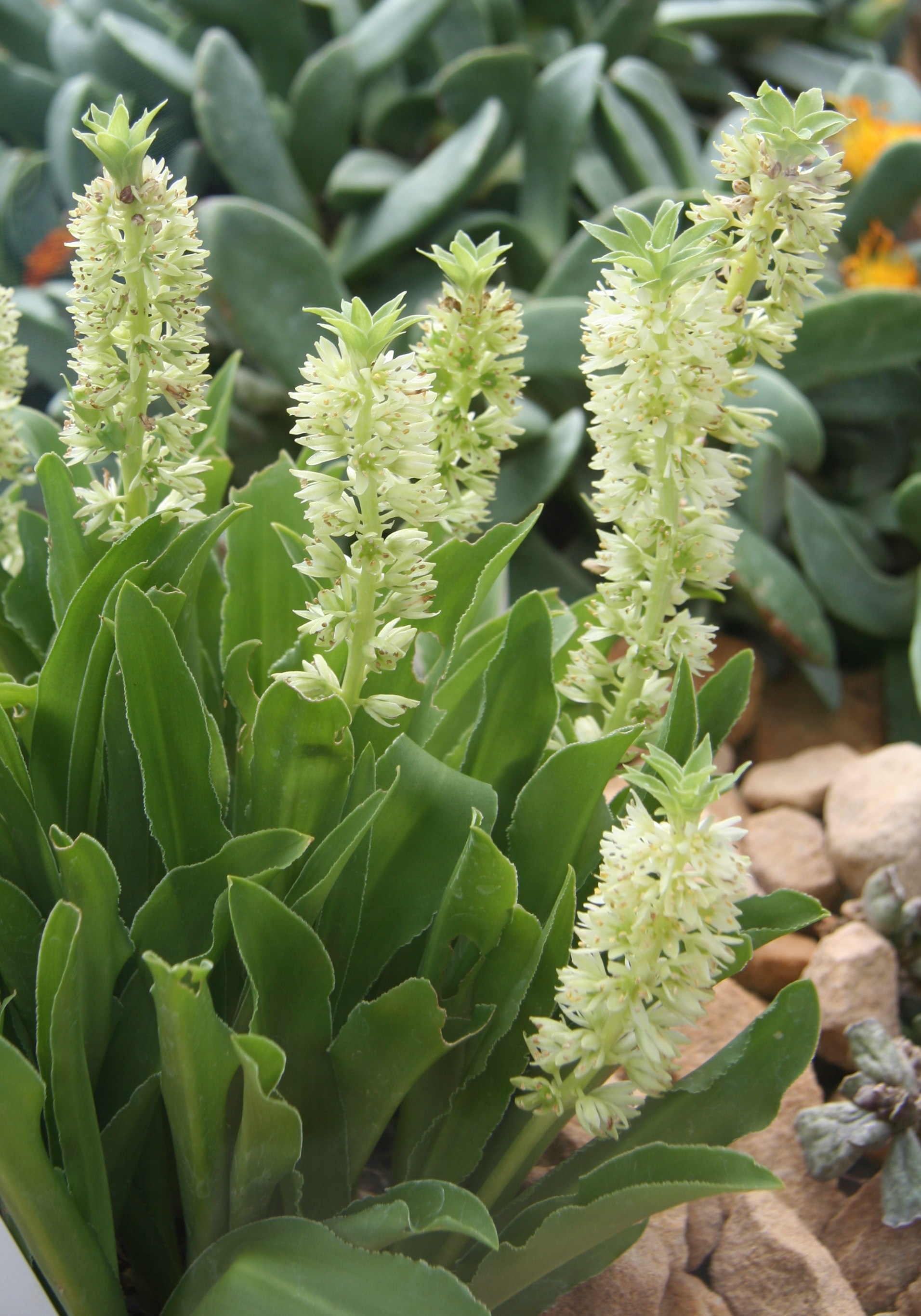 Eucomis zambesiaca im Botanischen Garten Dresden